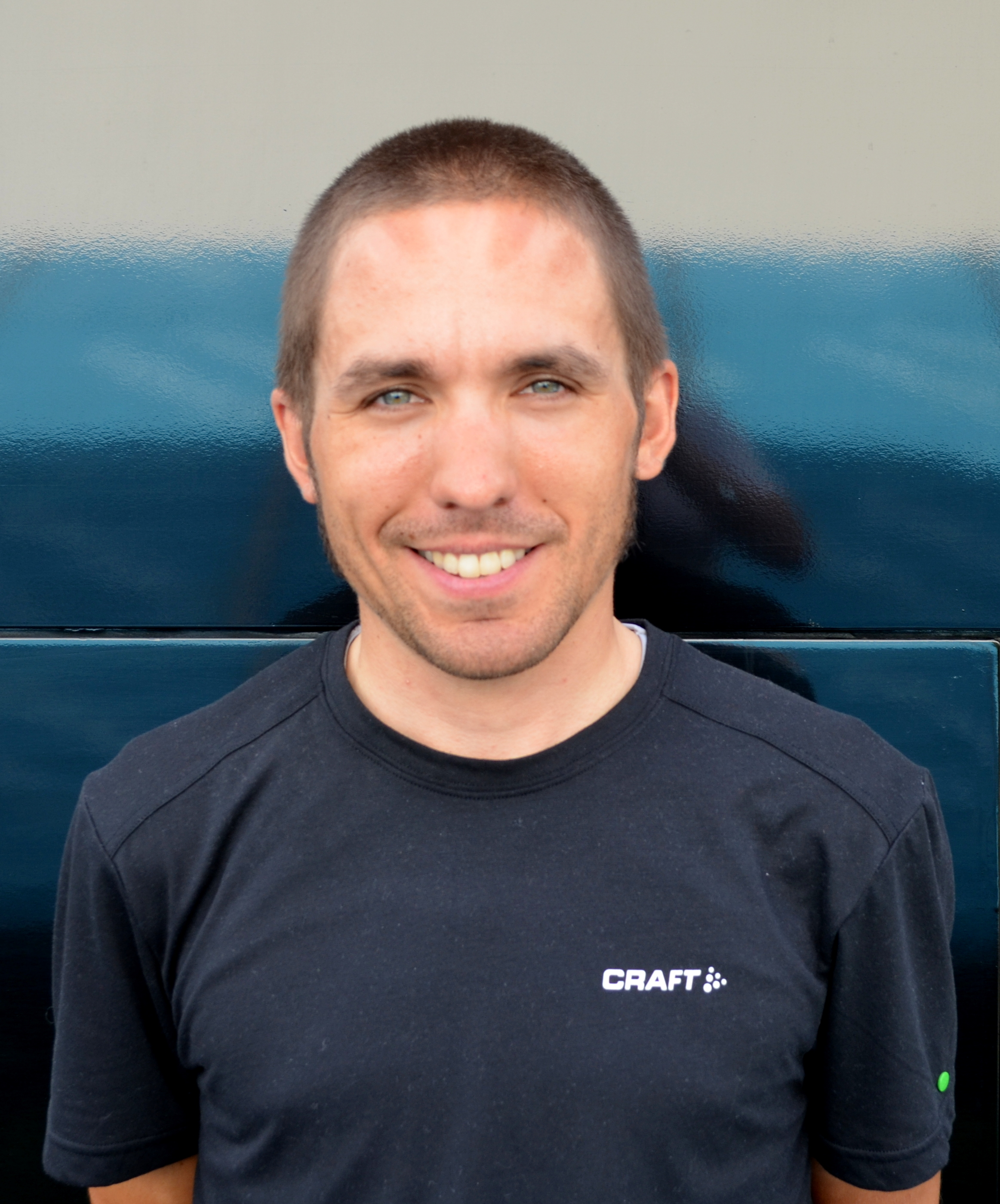 Tour de l'Ain 2015, au soir de la troisième étape.